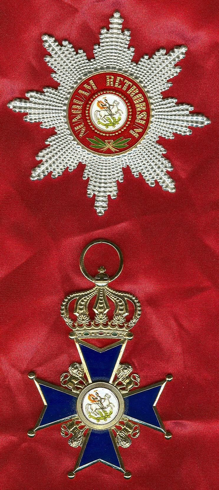 Eigen collectie Eigen scan Robert Prummel 10 jun 2006 01:52 (CEST)